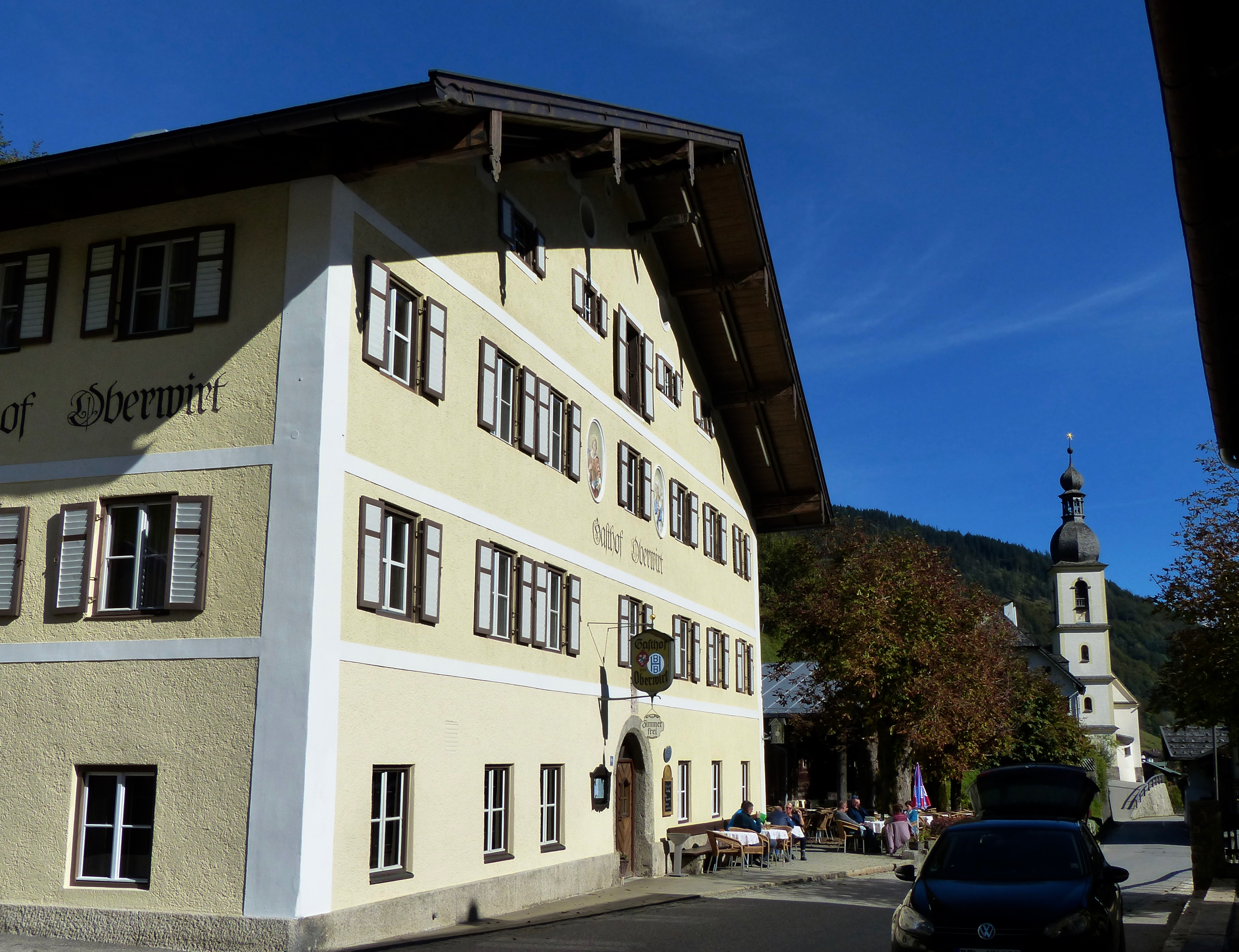 Ramsau: Gasthof Oberwirt mit der Ramsauer Kirche im HintergrundThis is a photograph of an architectural monument.